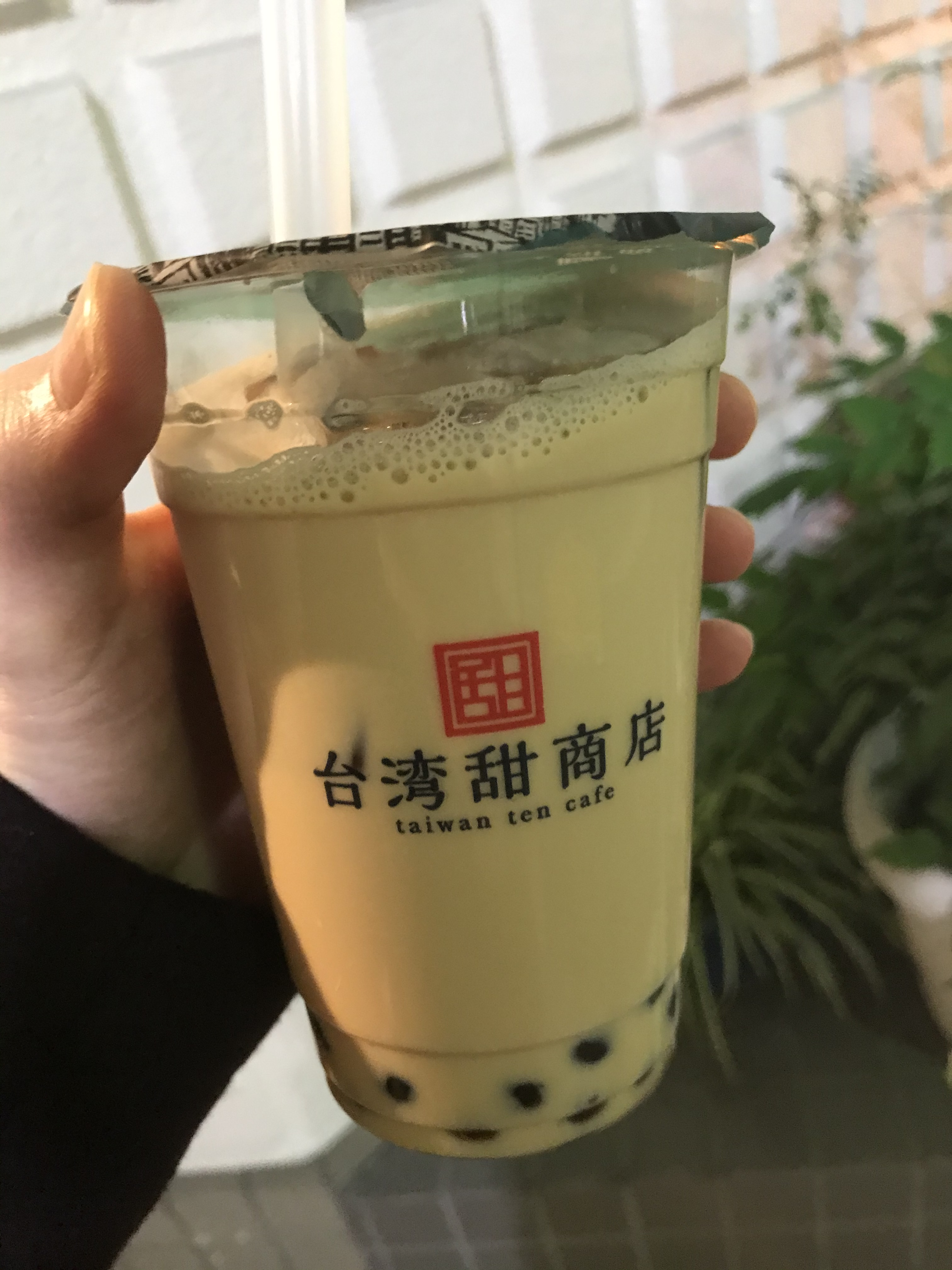 台湾甜商店のタピオカミルクティー 2019年の日本におけるタピオカブームの火付け役